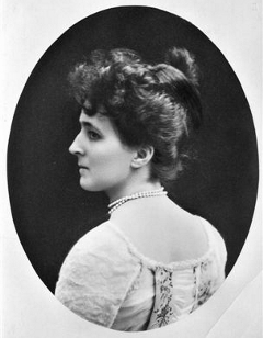 Maria Josepha von Portugal